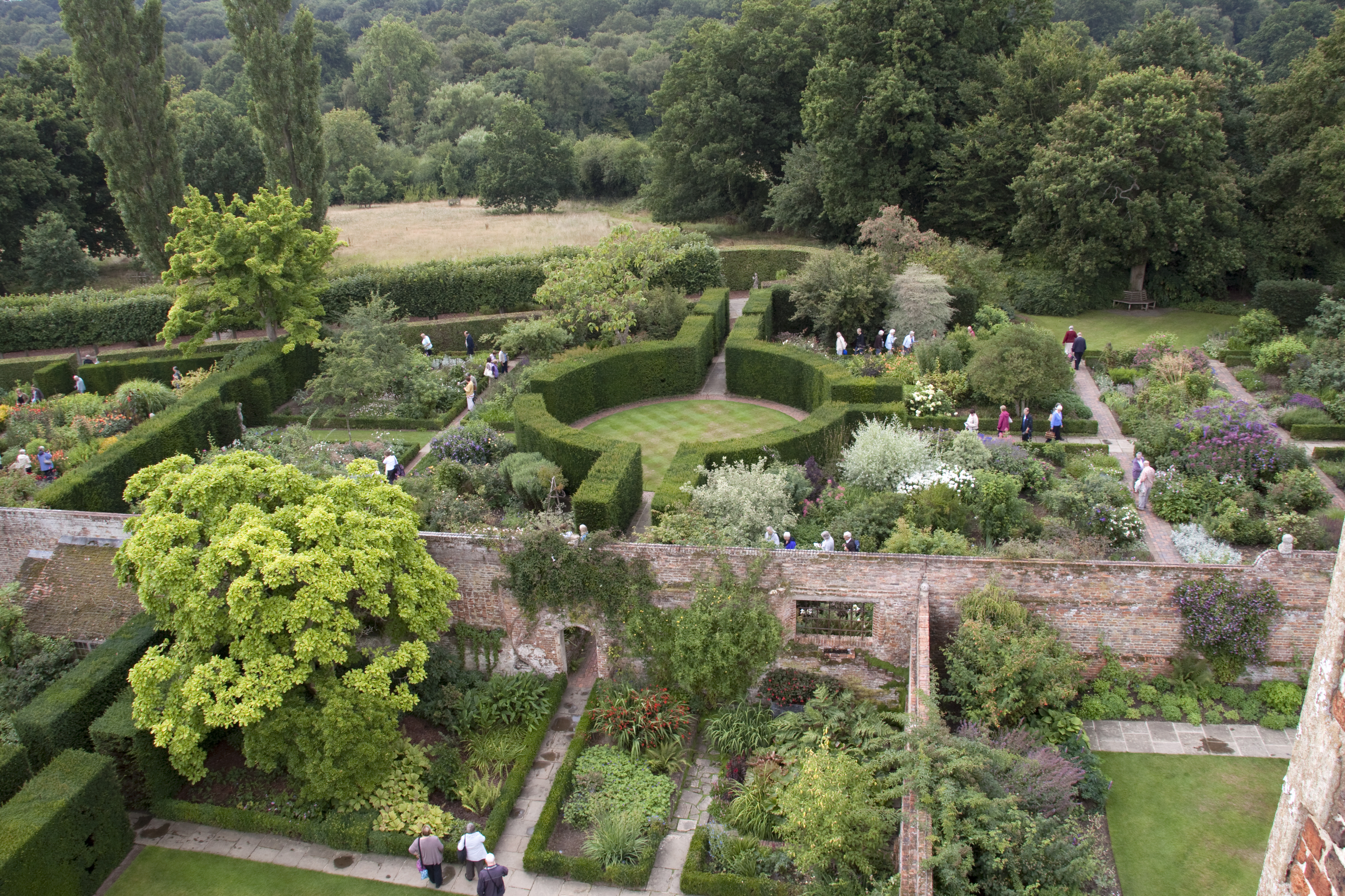 Sissinghurst Gardens 1